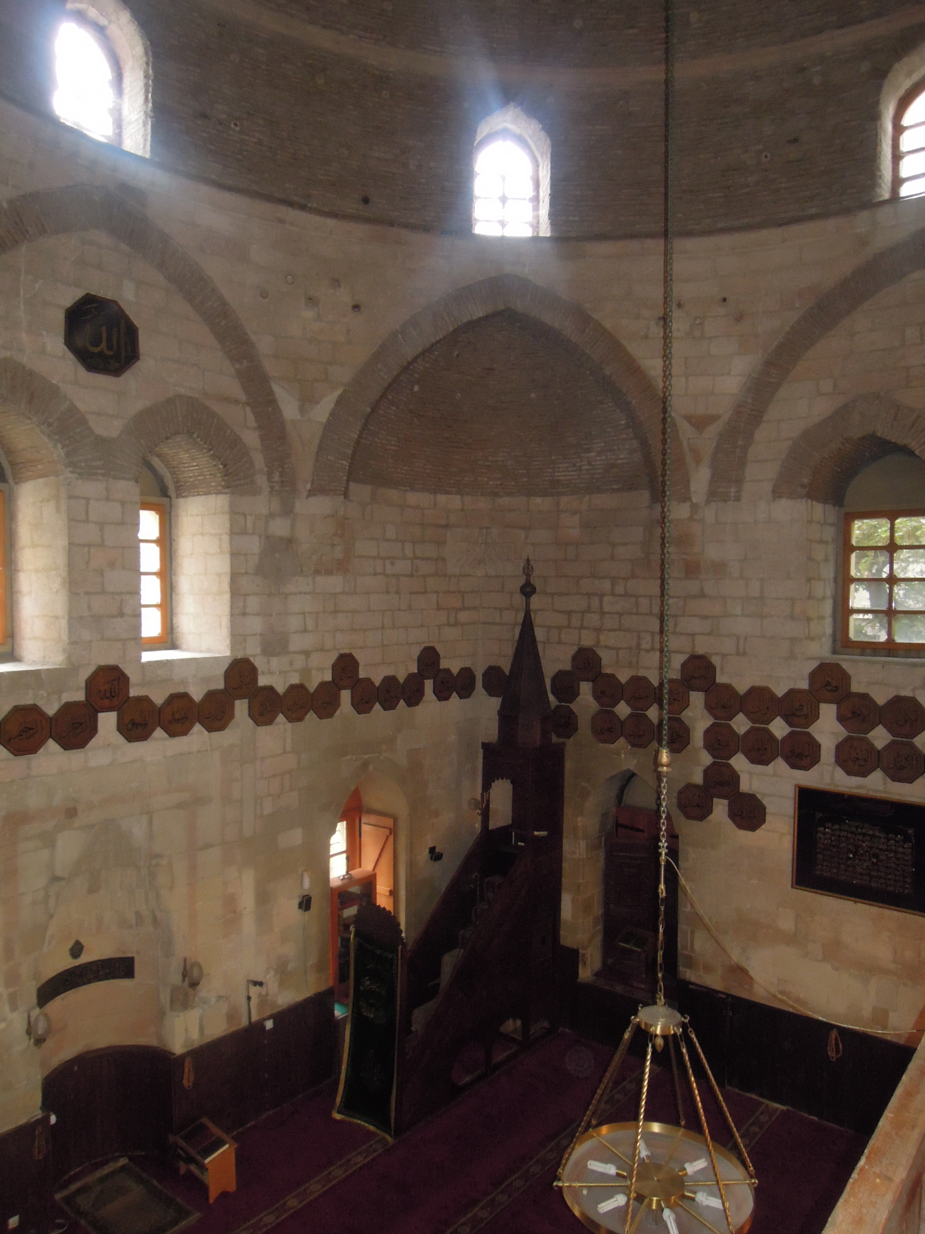 Бајракли џамија је саграђена око 1575. године, као једна од 273 џамија, колико их је у турско доба било у Београду.